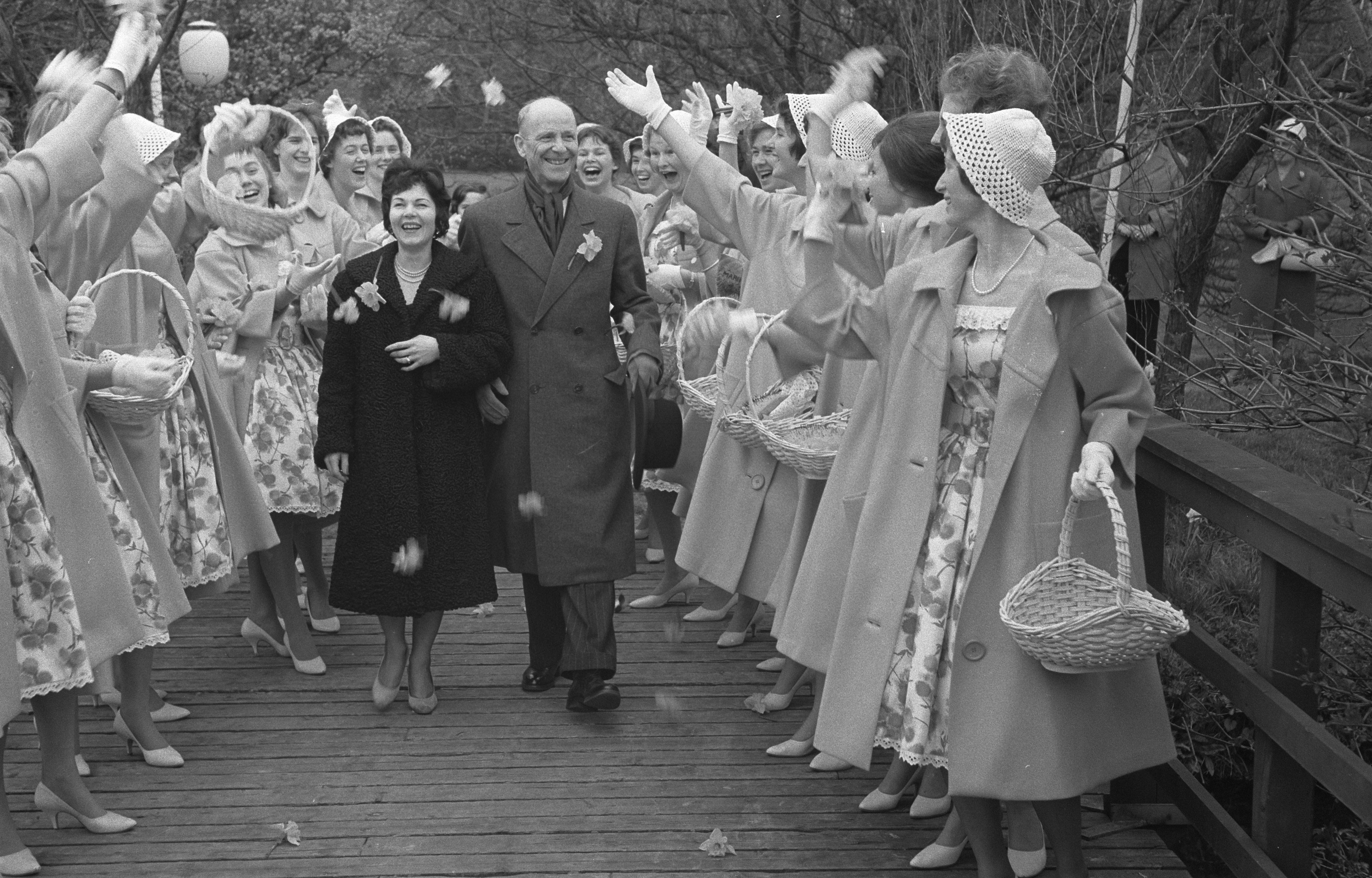 Collectie / Archief : Fotocollectie Anefo Reportage / Serie : [ onbekend ] Beschrijving : Opening Linnaeus door E. de Haller , ambassadeur van Zwitserland Datum : 6 april 1960 Locatie : Zwitserland Trefwoorden : Openingen, ambassadeurs Persoonsnaam : HALLER E. DE, LINNAEUS Fotograaf : Pot, Harry / Anefo Auteursrechthebbende : Nationaal Archief Materiaalsoort : Negatief (zwart/wit) Nummer archiefinventaris : bekijk toegang 2.24.01.05 Bestanddeelnummer : 911-1534